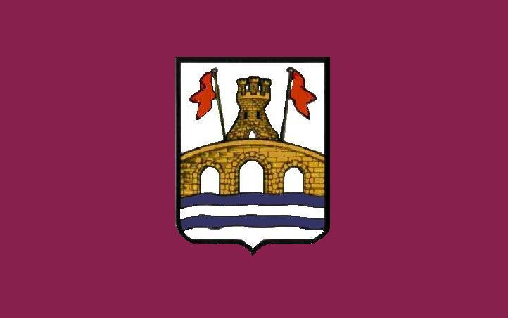 bandera de lodosa / lodosako ikurrina